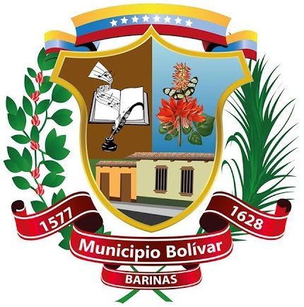 Escudo actual municipio Bolívar.